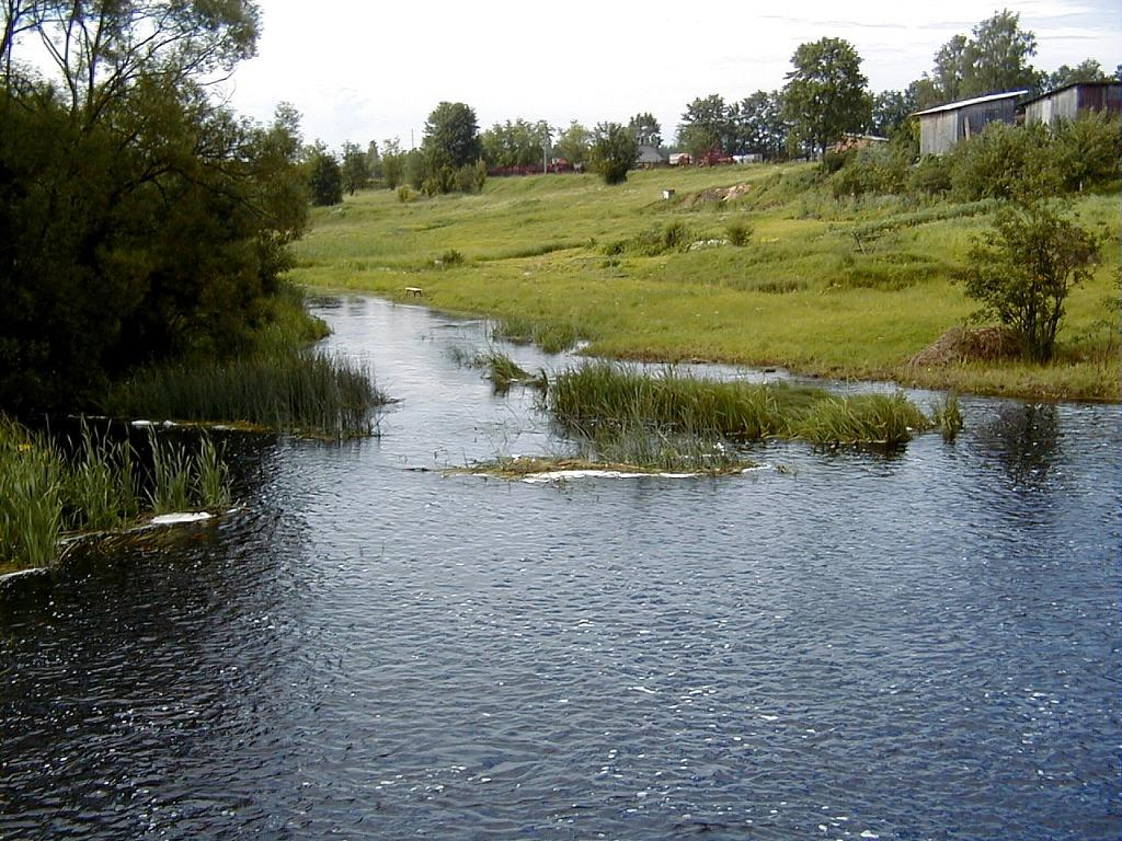 Река Синяя